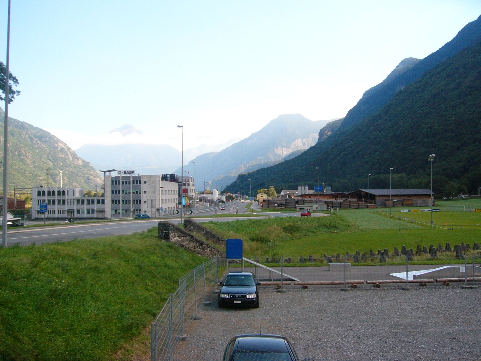 La zone industrielle d'Evionnaz, avec les Toblerone en avant plan.